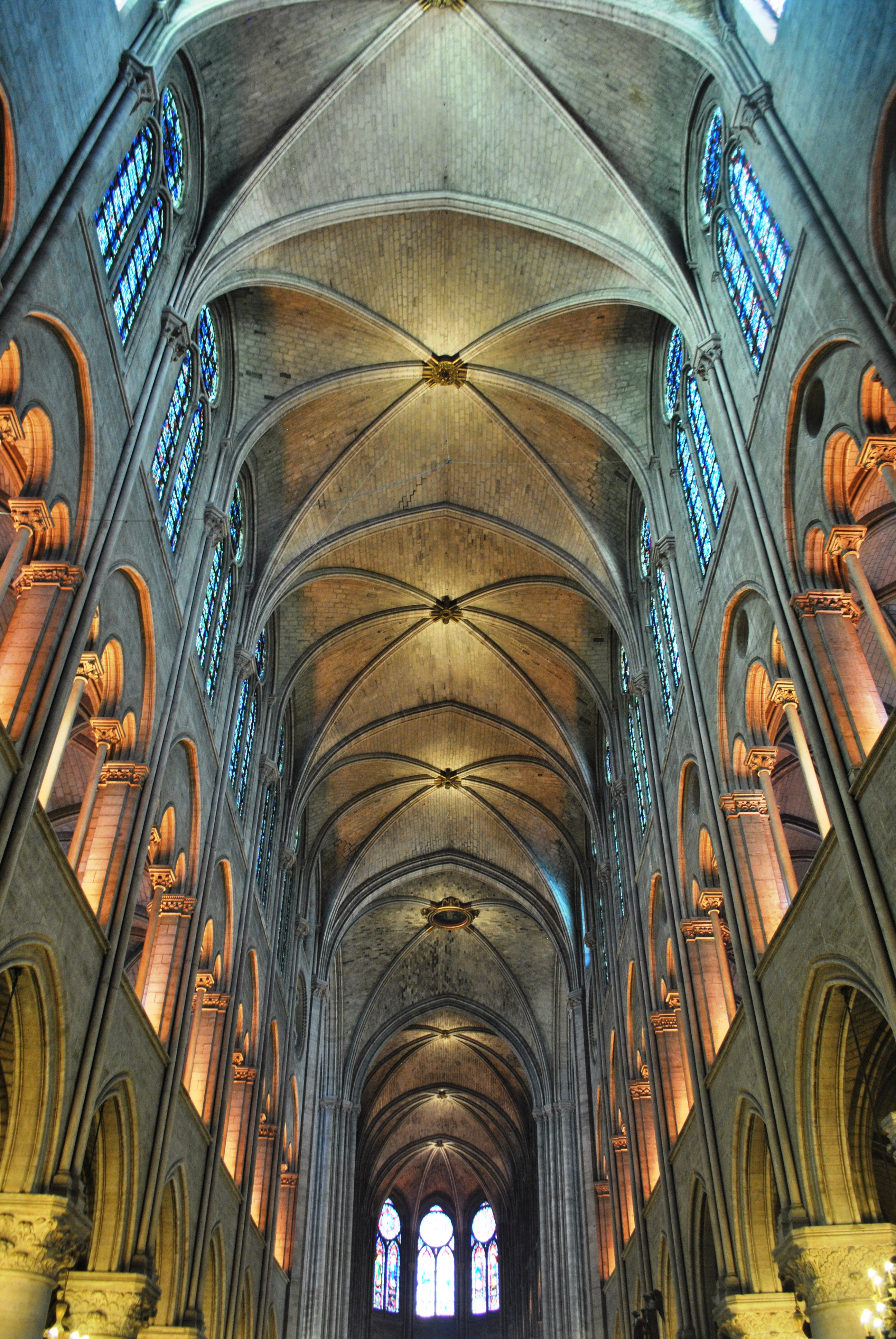 Cathédrale Notre-Dame (Classé) .